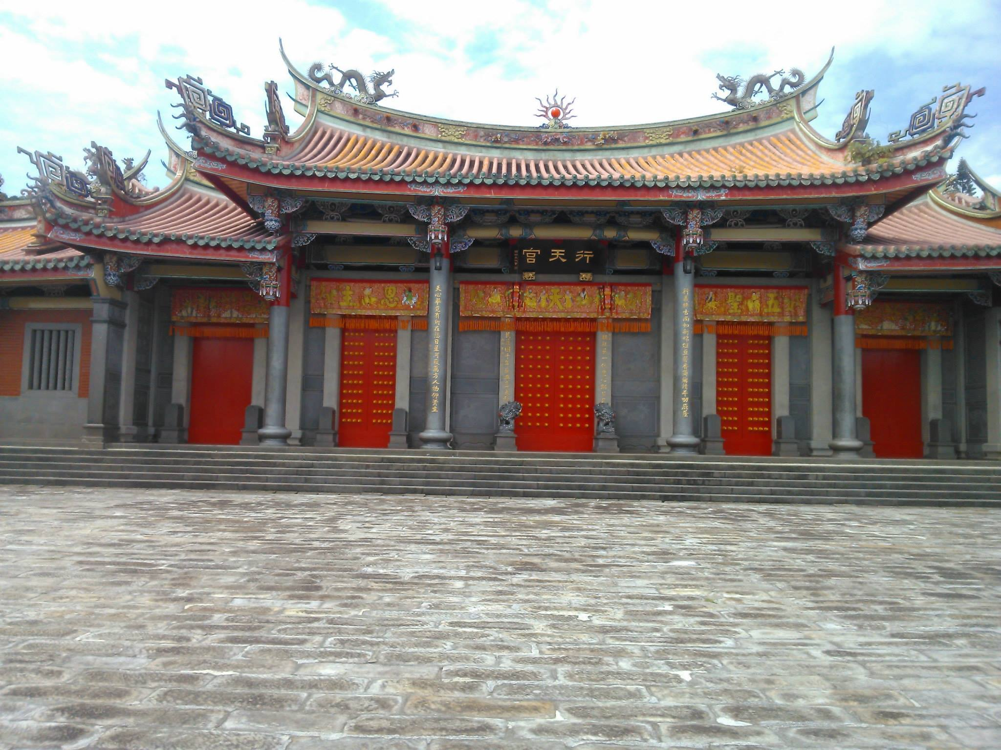 台灣行天宮之北投分宮